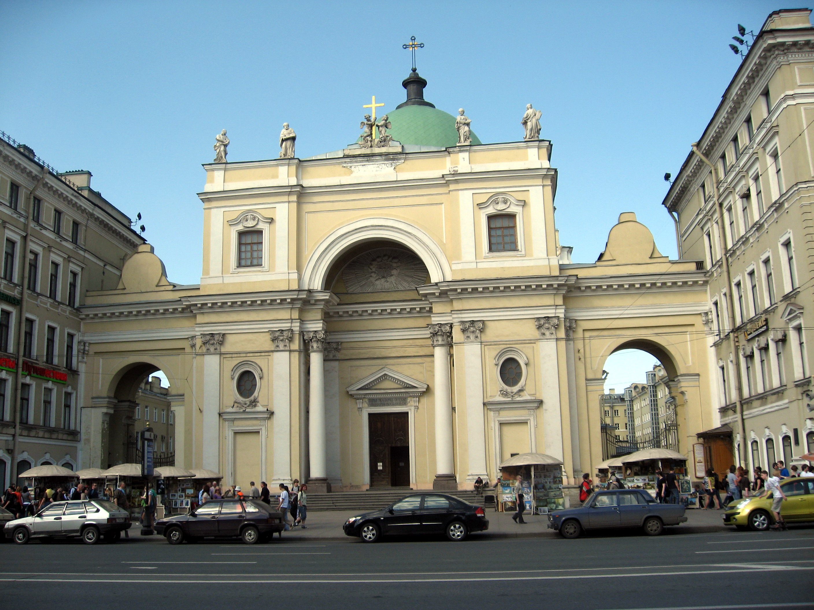 Sankt-Petěrburg